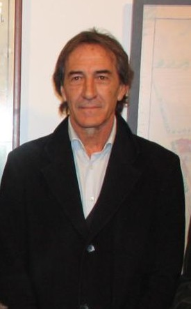 Presentació de l'exposició "Mestalla, 90 anys en imatges" a Torrent